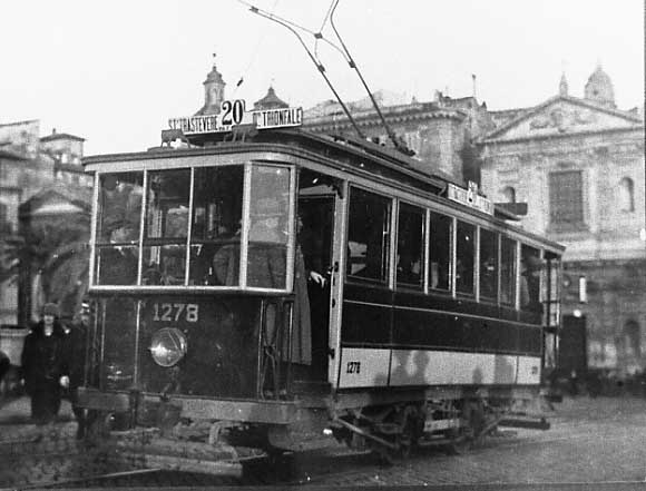 motrice terrazzini ex srto